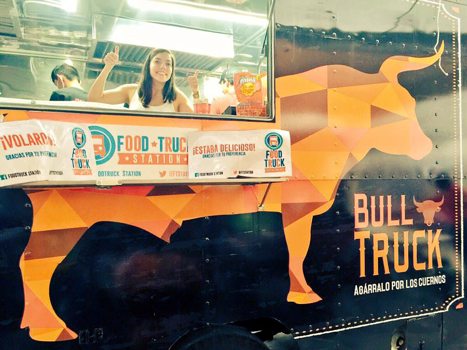 Foodtruck de cortes mexicanos de primera calidad.